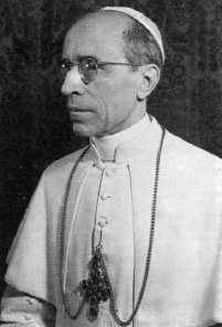 Foto che ritrae Papa Pio XII, al secolo Eugenio Pacelli.